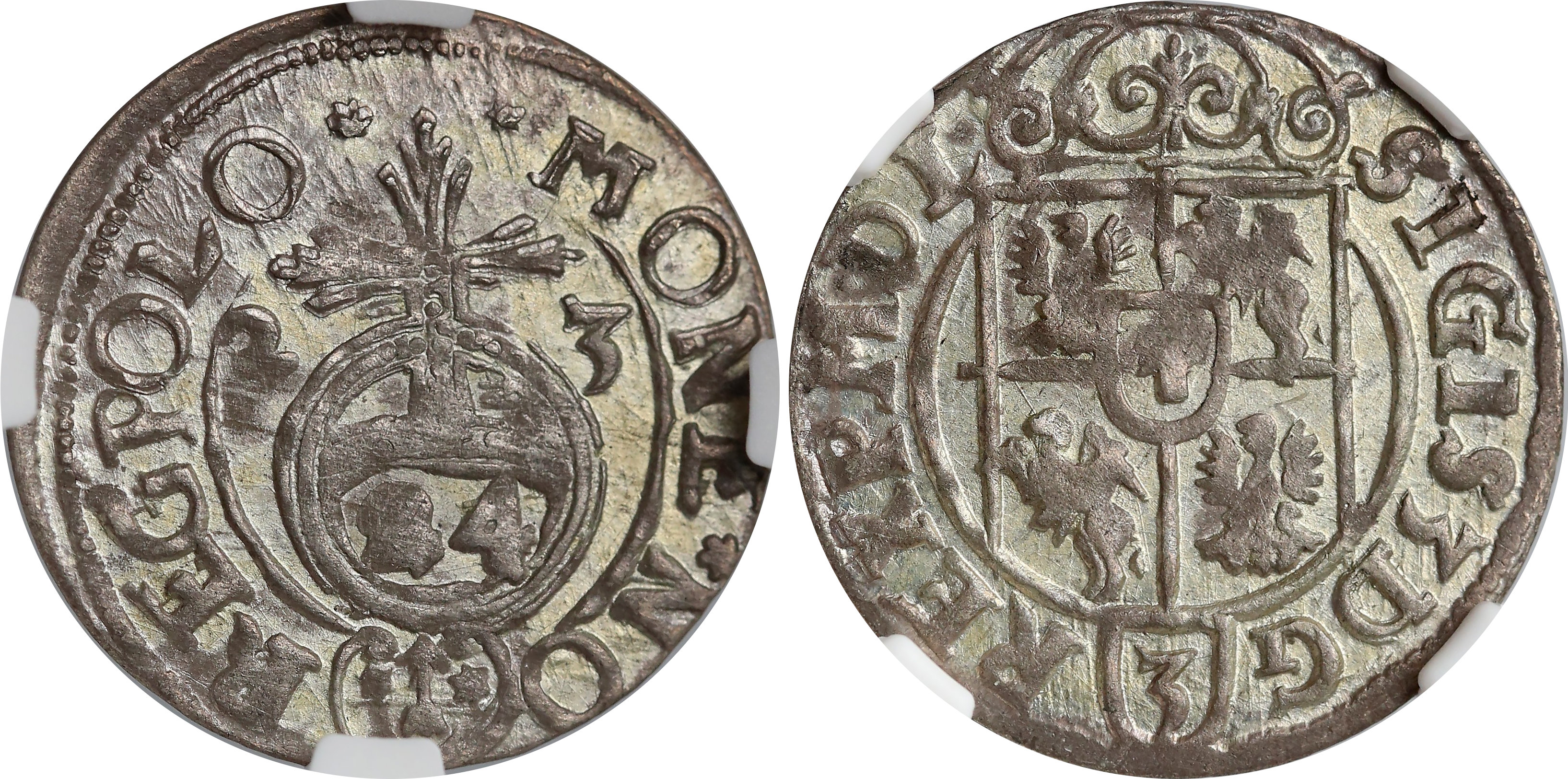 Półtorak koronny 1623 Bydgoszcz